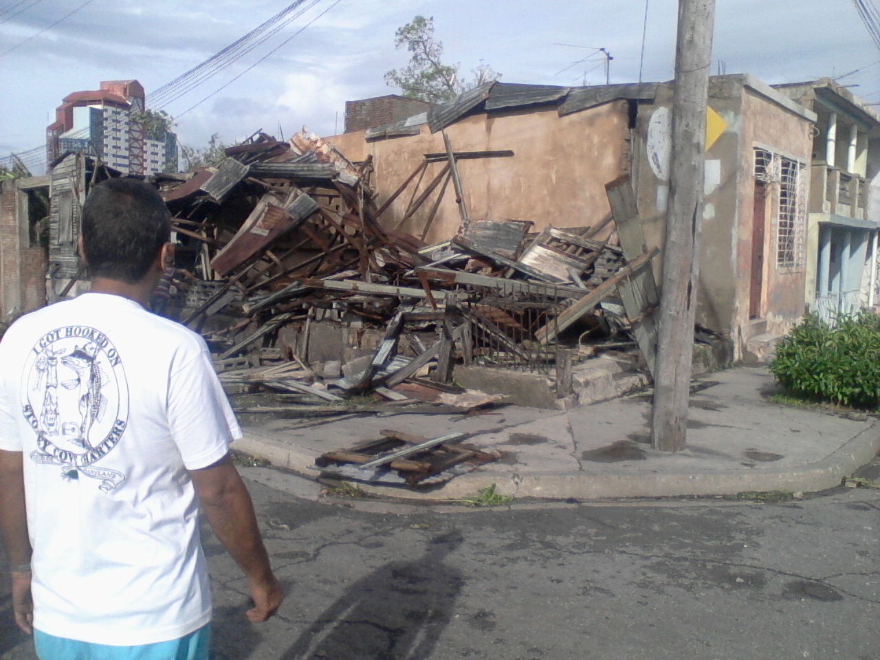 Donde solo hay escombros y basura, habia una casa antes del paso por Santiago de Cuba del huracán Sandy.